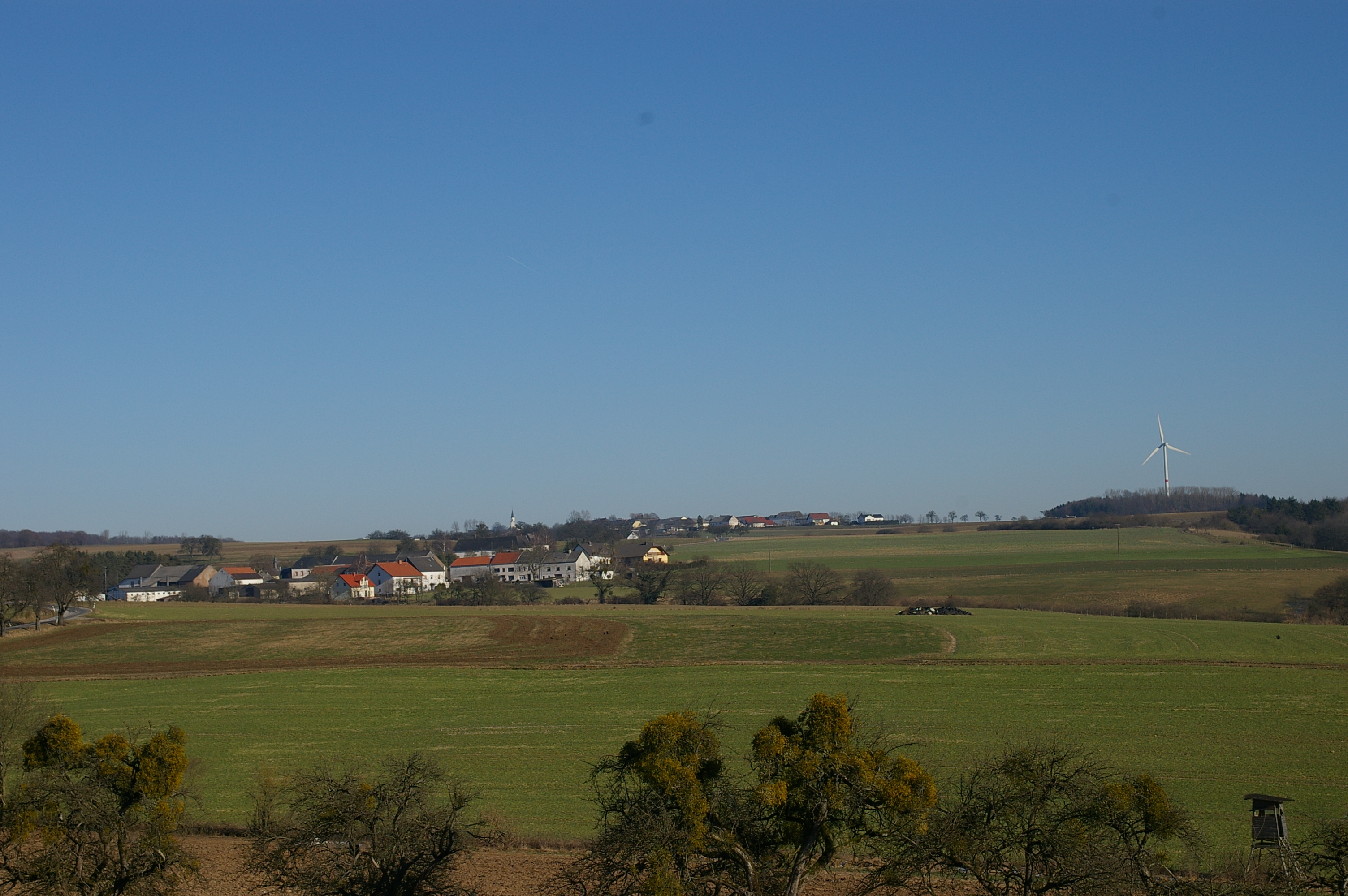 Saargau bei Merzkirchen: Blick nach Osten von der L132 auf die Ortsteile Südlingen (vorne) und Dittlingen (hinten)